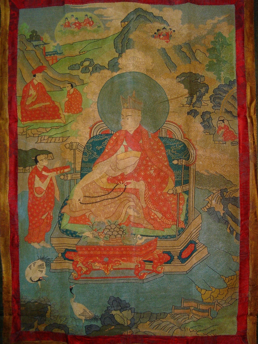 中文（台灣）: 刺繡（打籽繡）唐卡